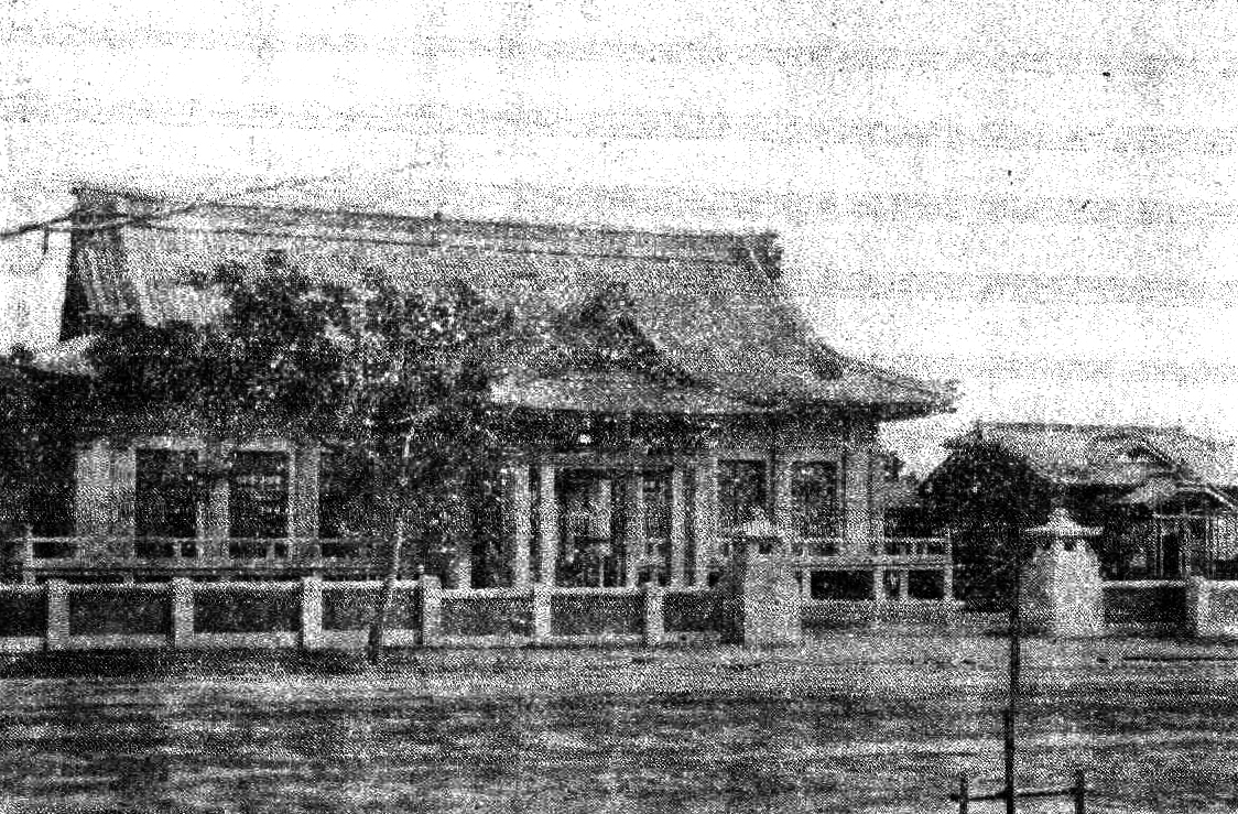 第一代臺中武德殿位於台中公園南側，1930年拆除